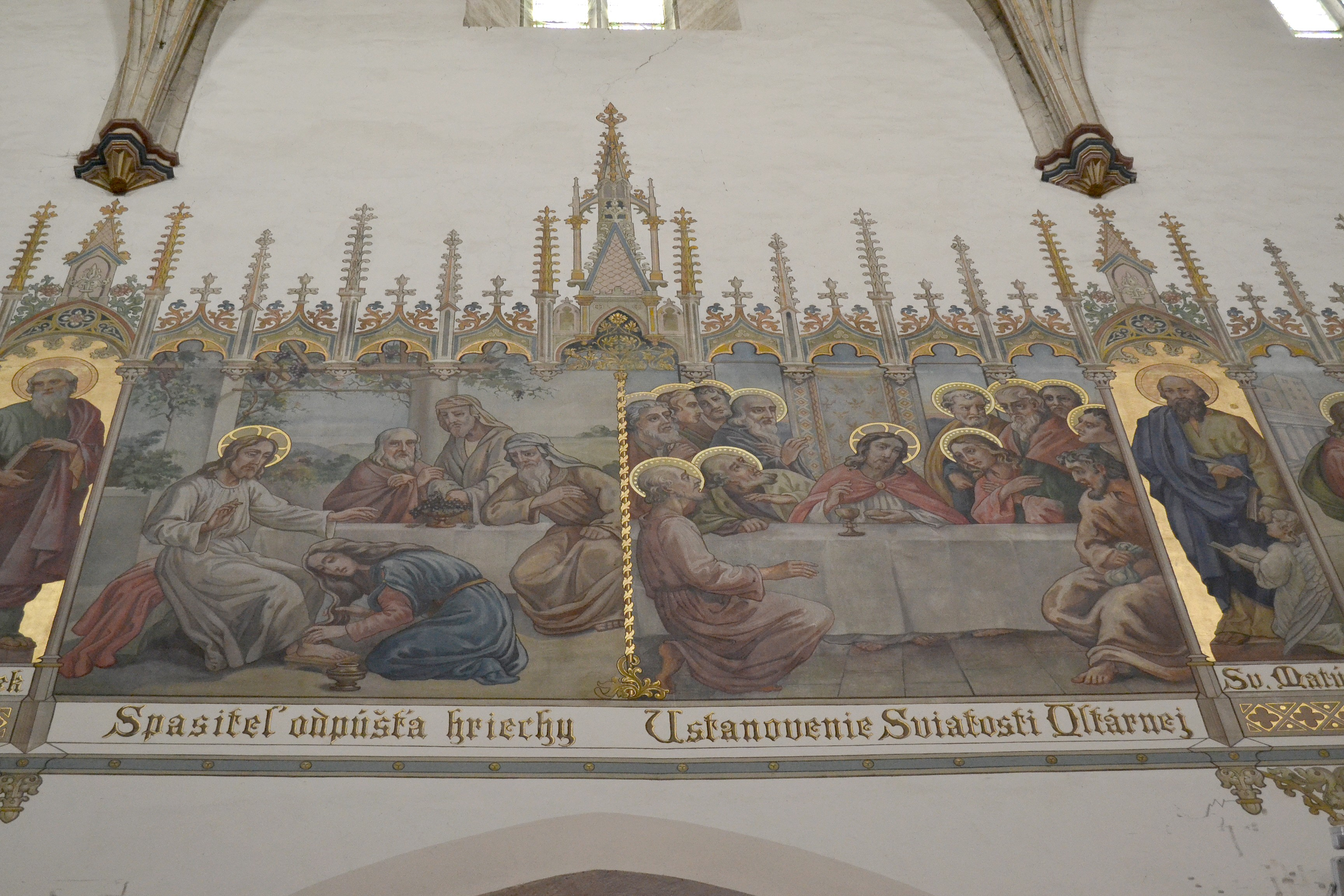 Bazilika svätého Mikuláša; severný múr hlavnej lode; maľby s výjavmi z Nového zákona